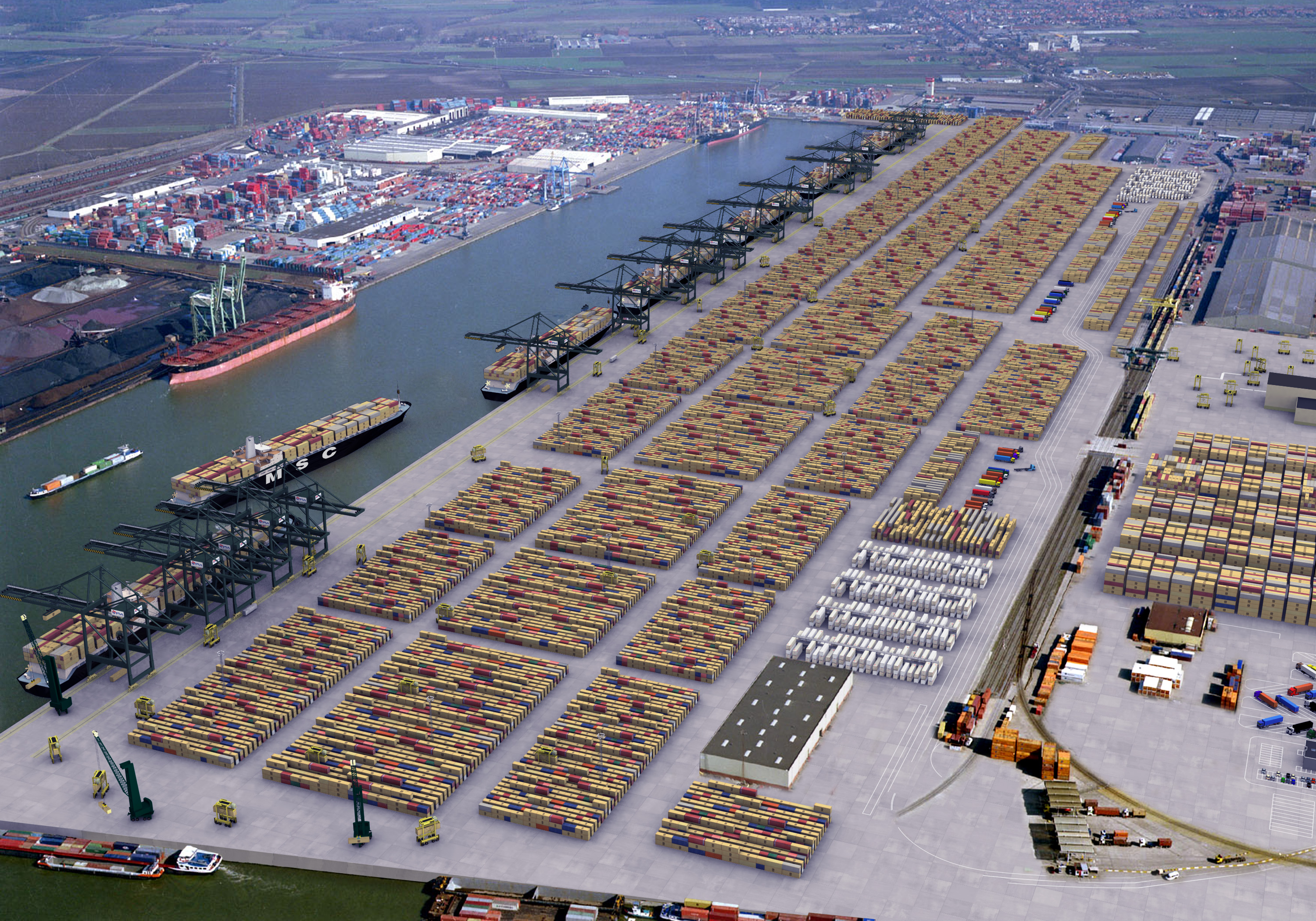 Zicht op de situatie op de MSC Home Terminal aan het Delwaidedok in 2006 (artistieke impressie).